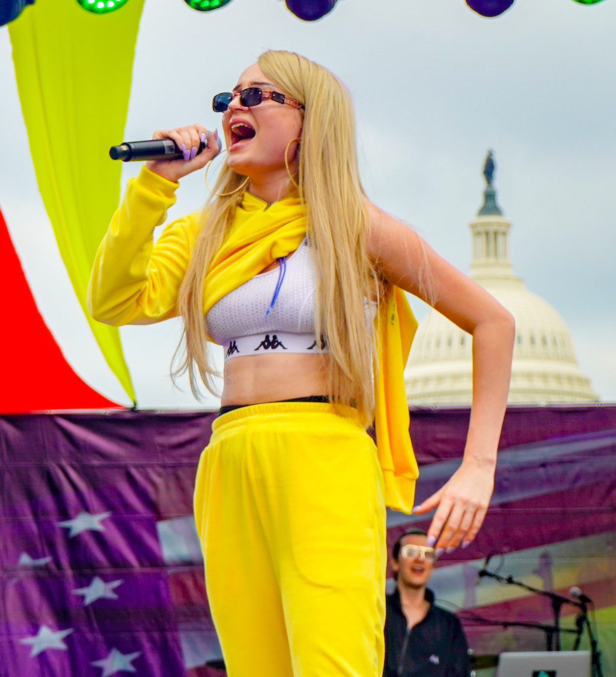 Kim Petras performs - Capital Pride concert 2018